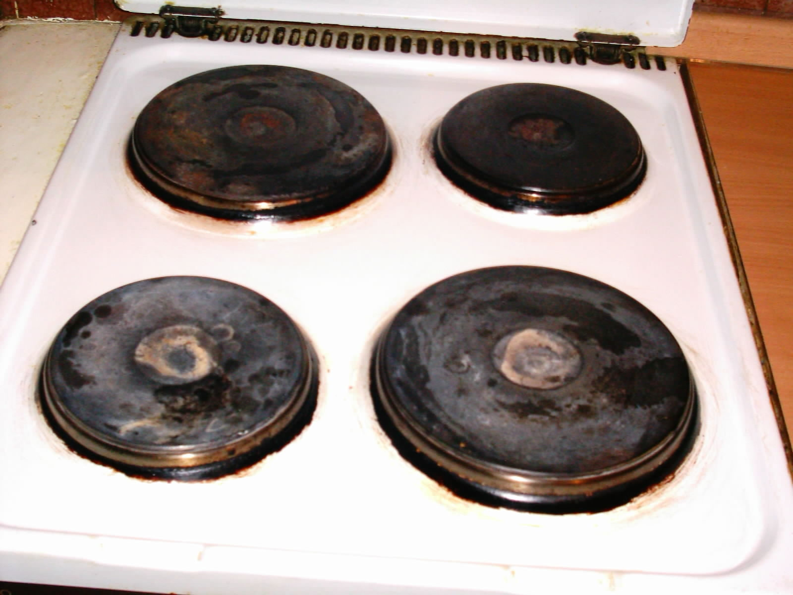 Рингле на електричном штедљаку. Драган Цветковић Ниш.